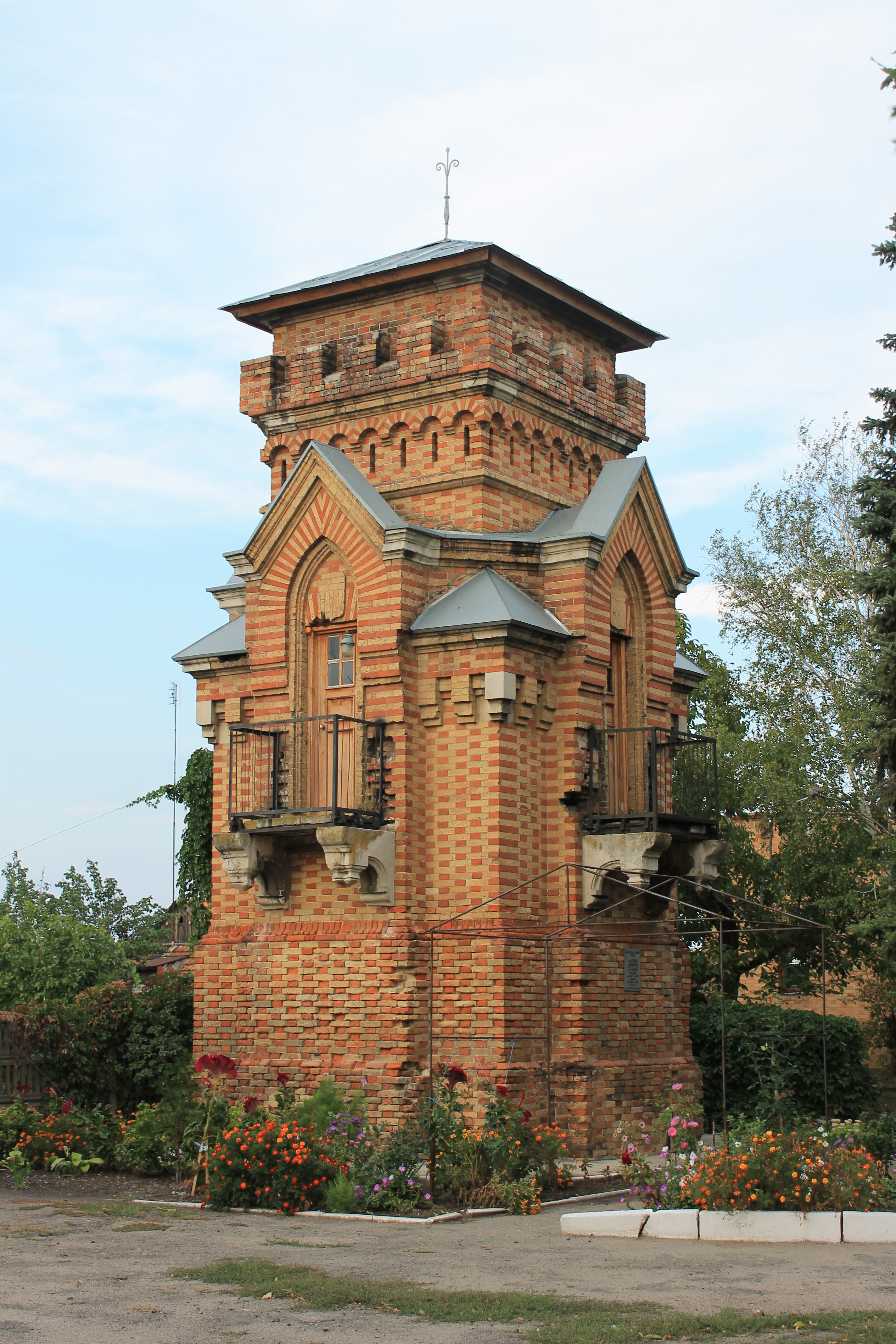 Оглядова башта 1894р., Садиба Попова, вул. Гагаріна, м.Василівка, Запорізька обл.